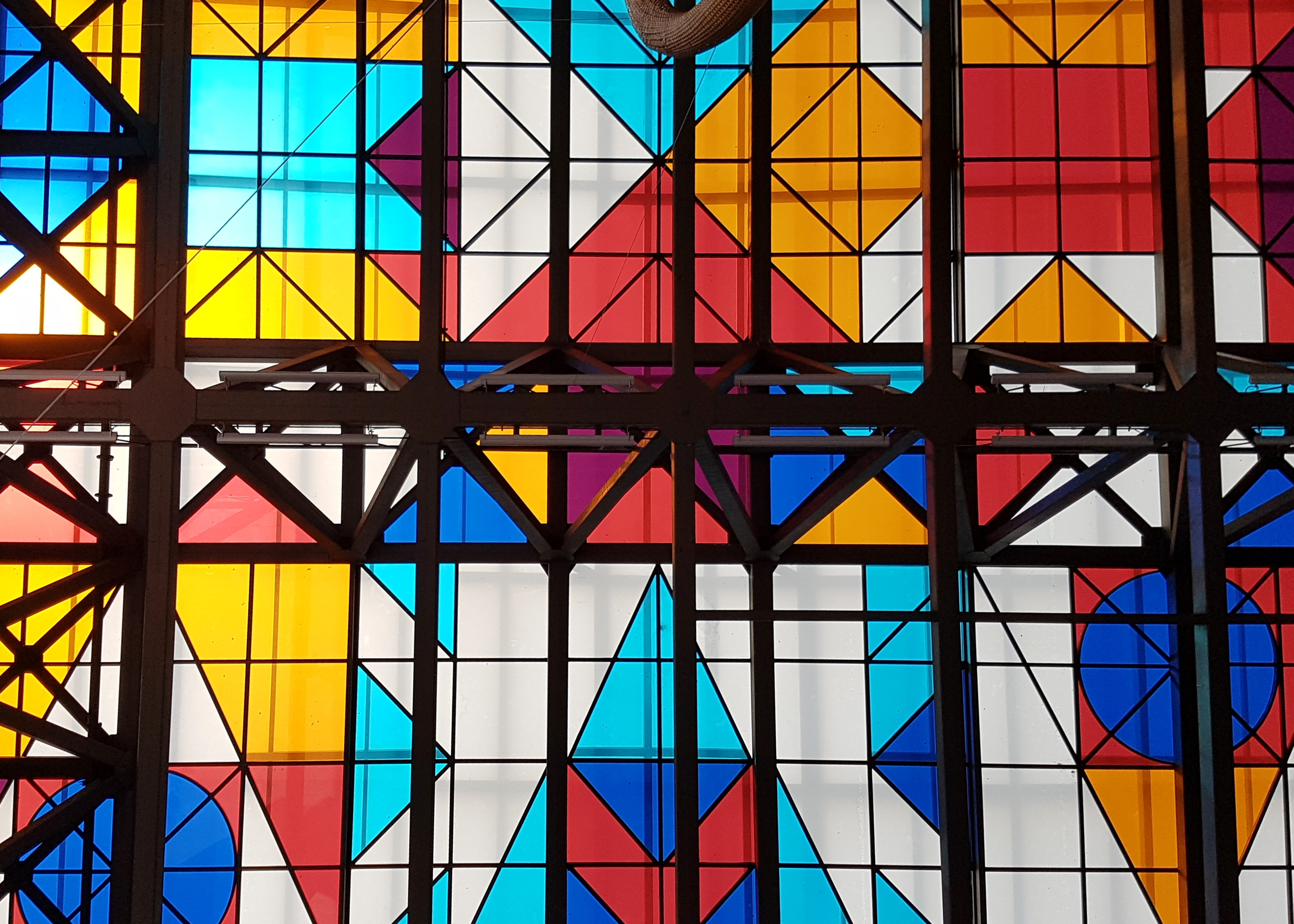 Volantín, vitral de acrílico, obra de 1972 de Juan Bernal Ponce reconstruida después del incendio de 2006; está en la plaza central del Centro Cultural Gabriela Mistral, Santiago de Chile. El edificio UNCTAD III tenía una serie de obras artísticas incorporadas. Después del golpe de Estado que en septiembre de 1973 derrocó al gobierno del socialista Salvador Allende, el complejo se convirtió en sede de la Junta Militar encabezada por el general Augusto Pinochet y muchas de las obras fueron retiradas y algunas se perdieron. En 2010 se recuperaron unas y otras fueron rehechas.